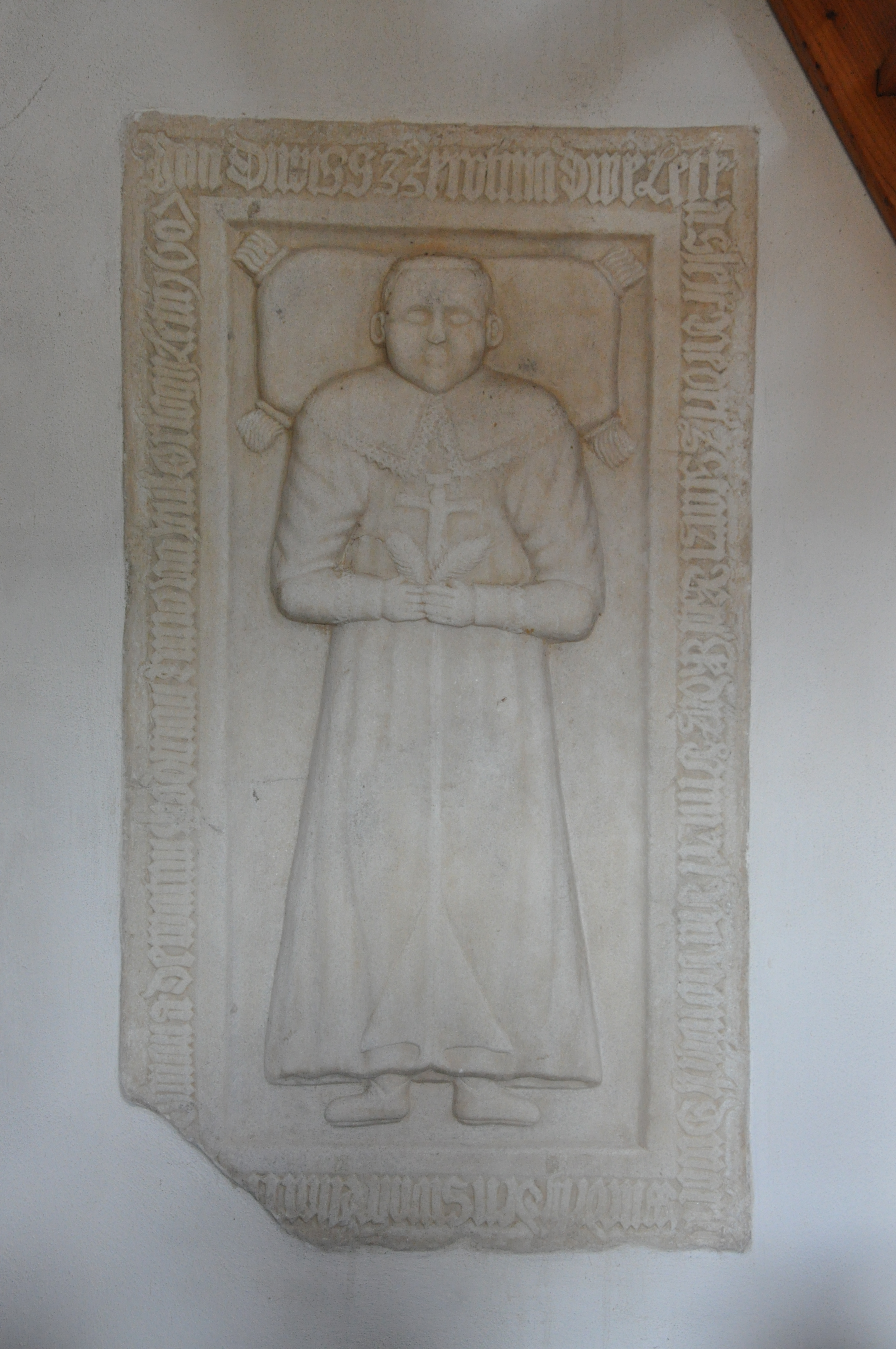 kámen Jana Diviše ze Žerotína (zemřel 1607) v kostele sv. Jakuba v Jakubu